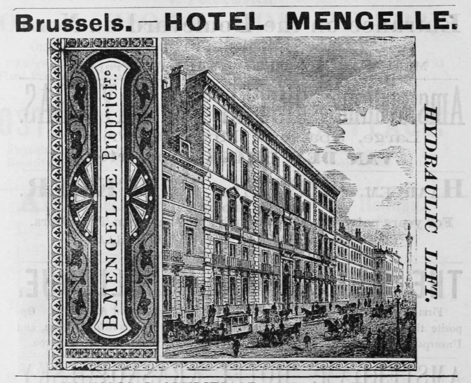 Hotel advertisement